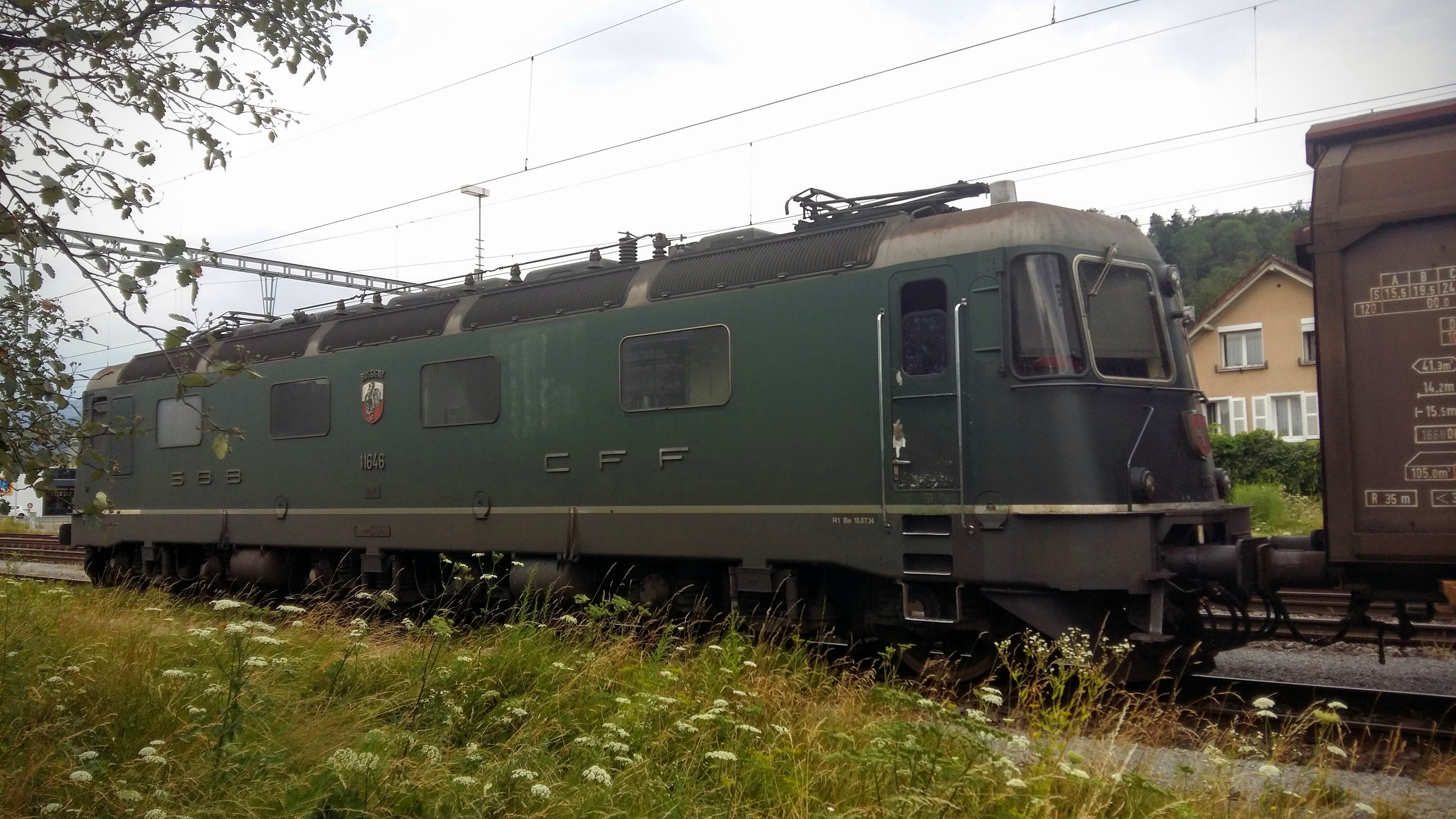 Re 6/6, 11646 Bussigny, im Bahnhof Heerbrugg, Seitenansicht von links